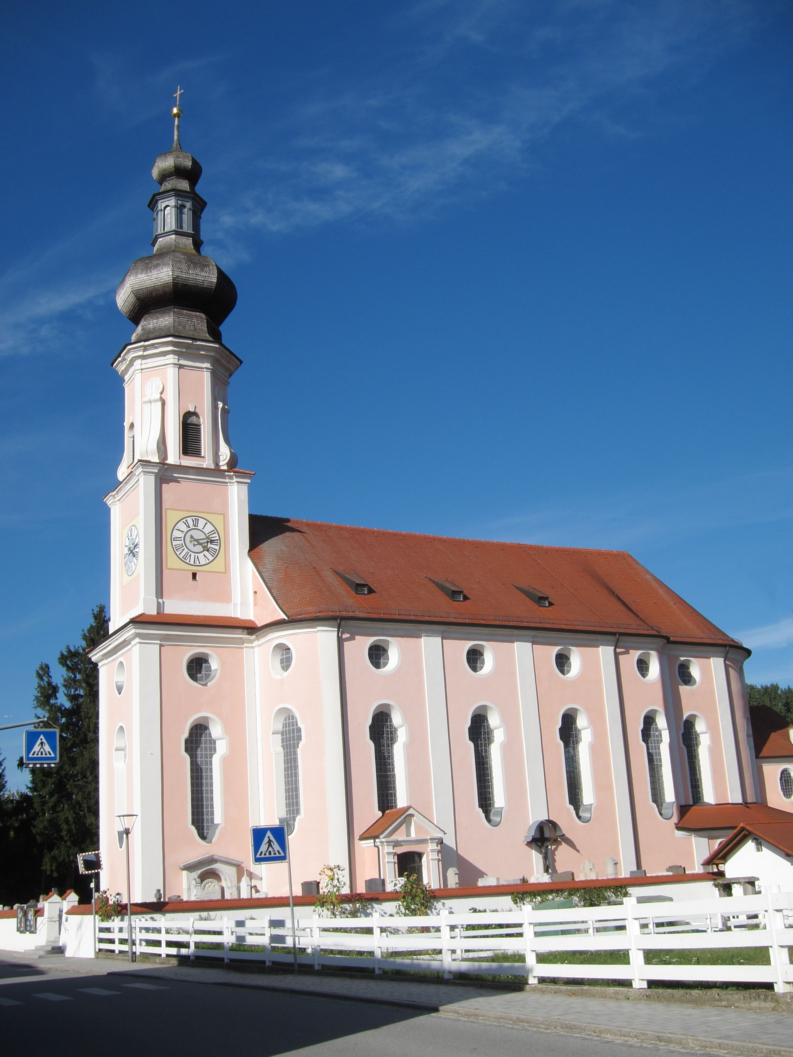 Kath. Pfarrkirche Mariae Heimsuchung, spätbarocker Saalbau mit eingezogenem halbrundem Chor und Spindelhelm, von Anton Kogler, 1712 ff., Turmoberbau von Johann Baptist Lethner; mit Ausstattung.